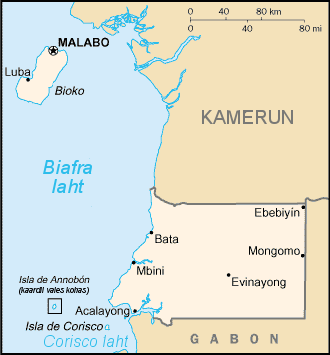 Ekvatoriaal-Guinea kaart